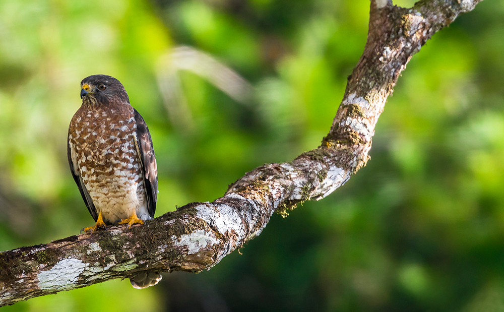 Fotografía tomada de un Double-toothed kite (Harpagus bidentatus), en el área de Altos del Maria, Panamá